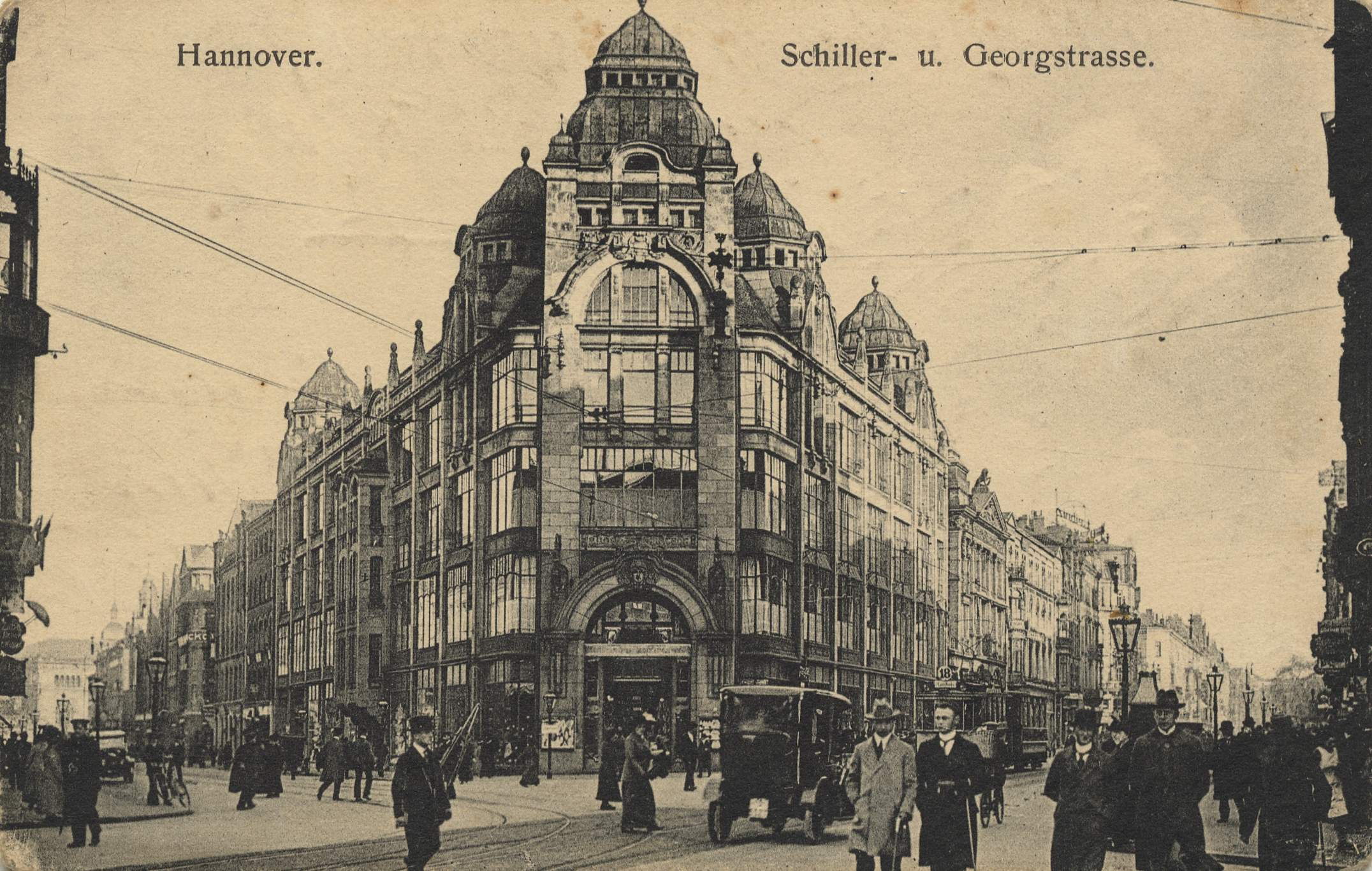 Hannover, Innenstadt, Kreuzung Schillerstraße / Georgstraße, Blick vom damaligen Steintorplatz auf das Warenhaus Karstadt (historische Ansichtskarte)